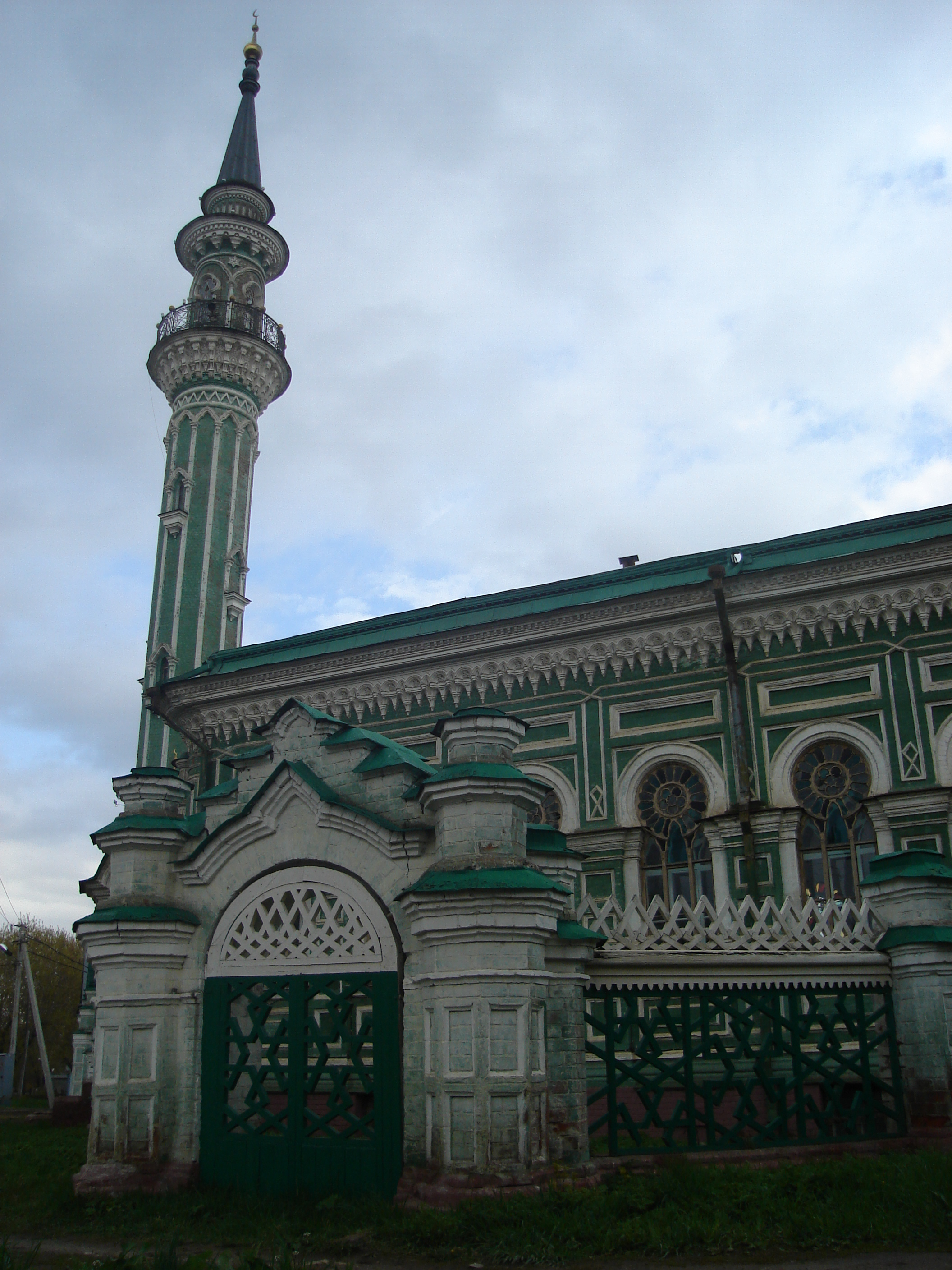 Acem Mosque, Äcem mäçete